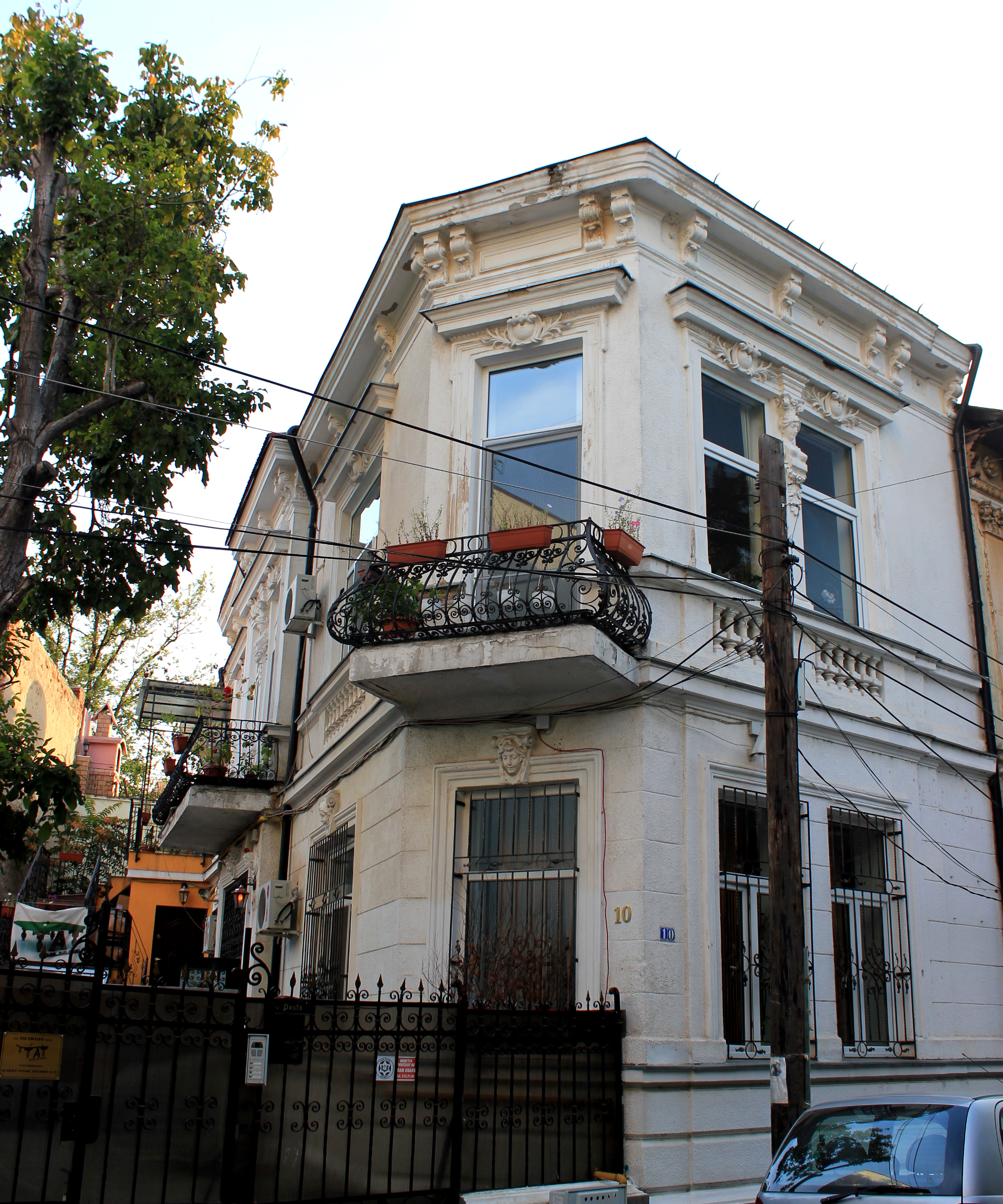 Casa Romano Alexandru 10